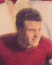 Il calciatore Luigi Giuliano con la maglia del Torino Calcio. Lo Sport illustrato, edizione 1954, Milano, Edizioni della Gazzetta dello Sport